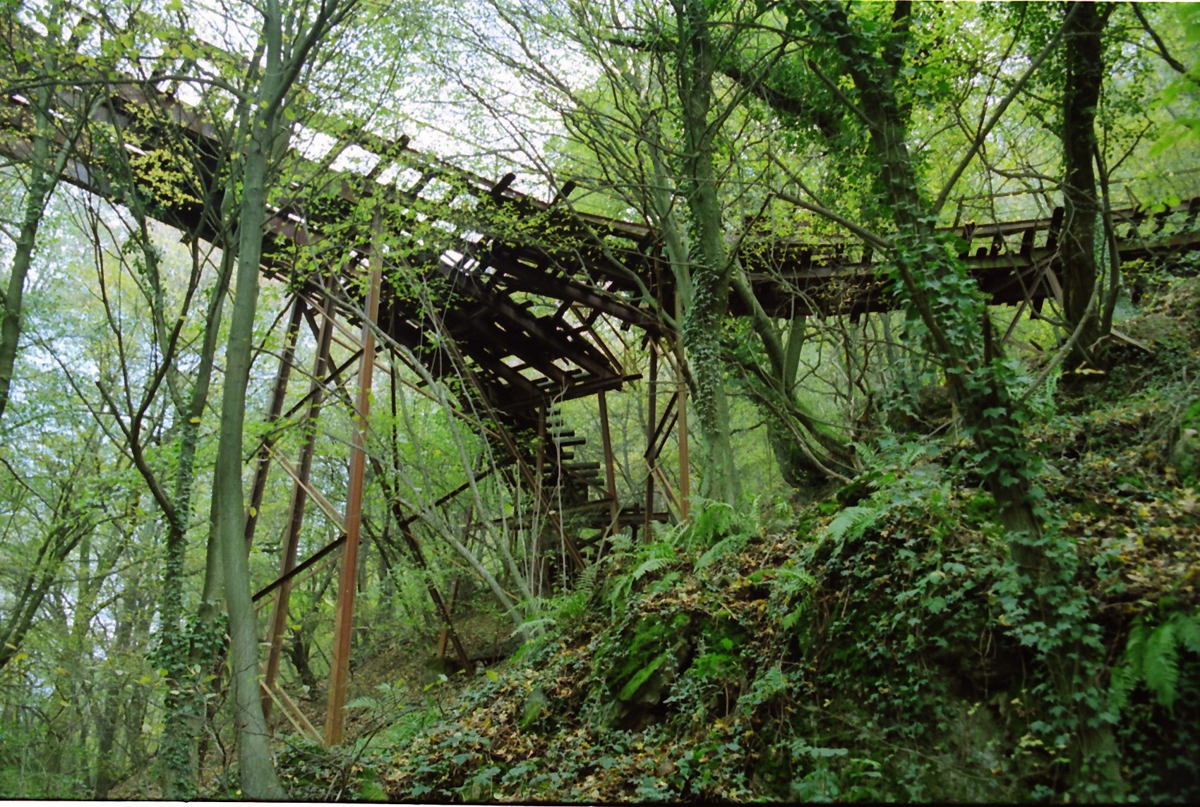 ALte Lorenbahn, die Nebenbrüche mit dem Vatter-Hauptbruch verband. Sie wurde schon vor 2002 (Vatterschließung) stillgelegt und vor ein paar Jahren abgebaut (Stand 2014)